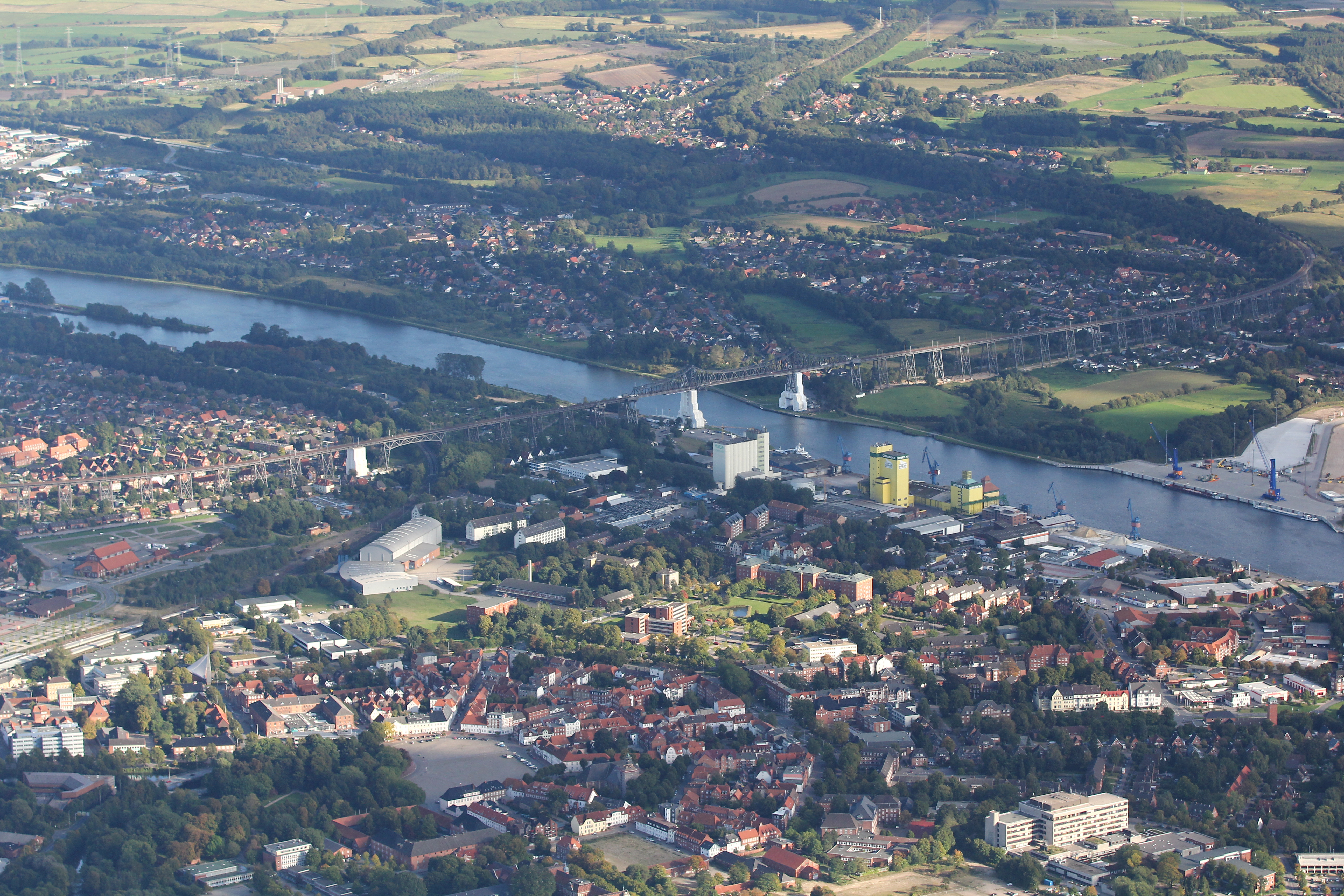 Luftbildaufnahme Rendsburger Hochbrücke, Rendsburg, Schleswig-Holstein, Deutschland, Blick nach Südost